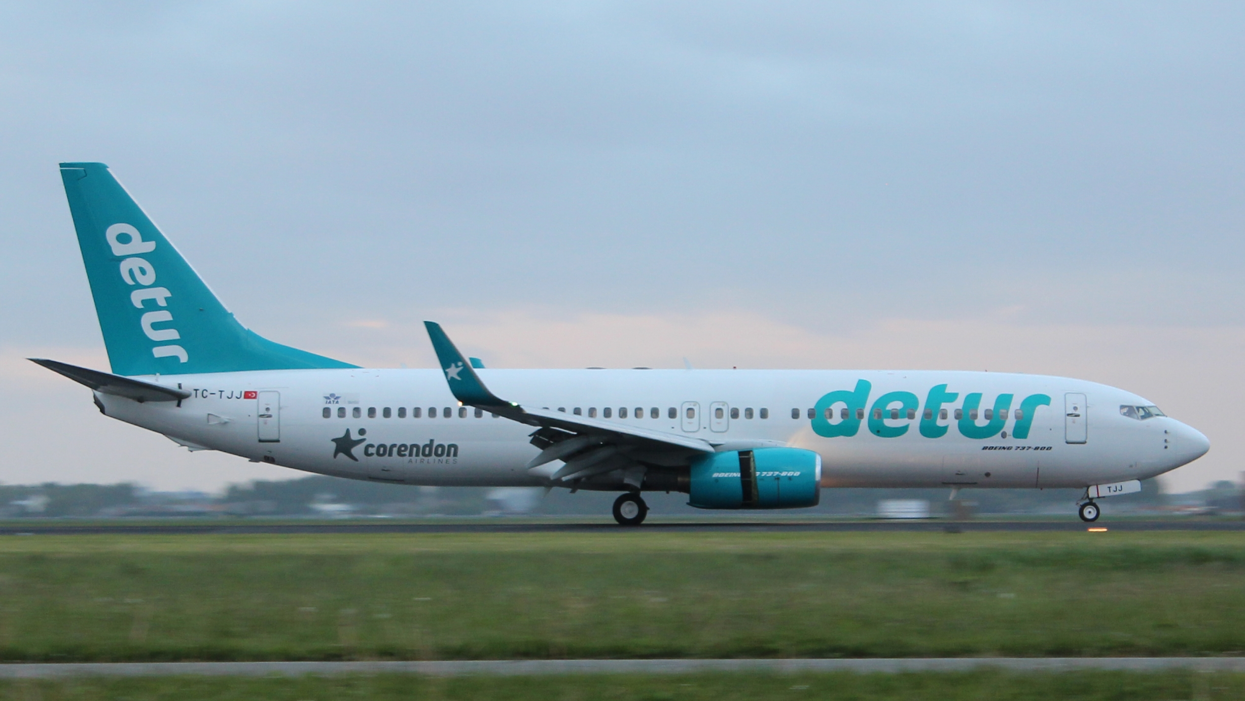 Corendon Detur